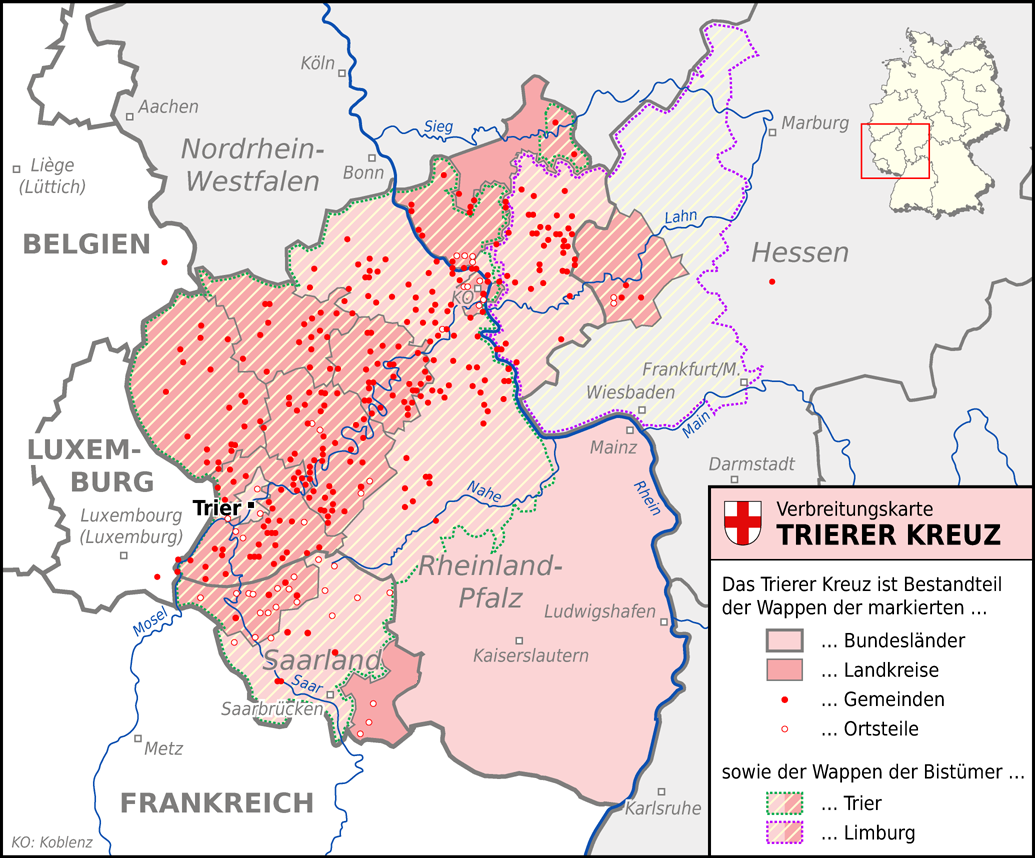 Bundesländer, Landkreise, Städte/Gemeinden und Stadtteile/Ortsteile mit dem Trierer Kreuz im Wappen